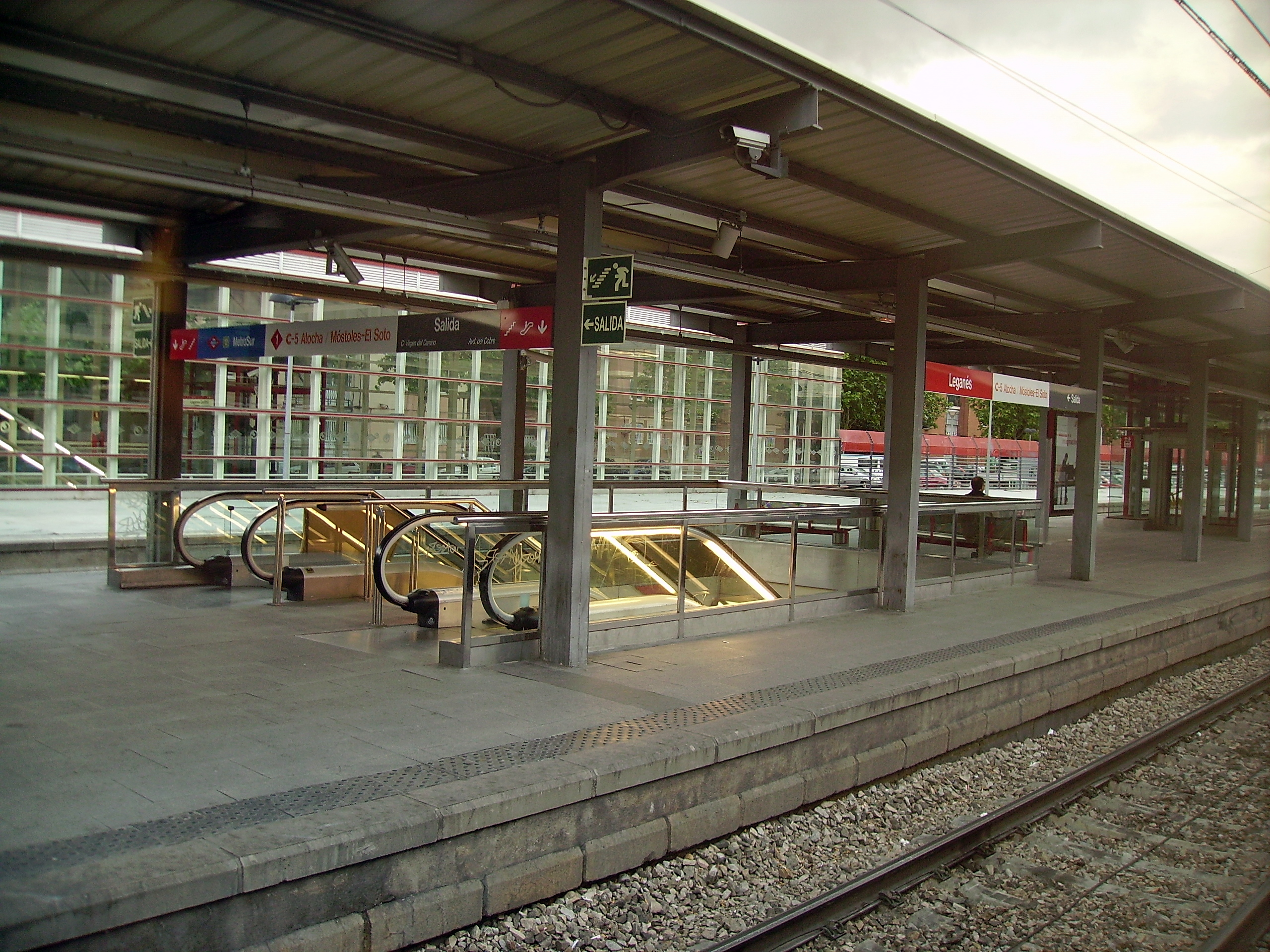 Vista de los andenes